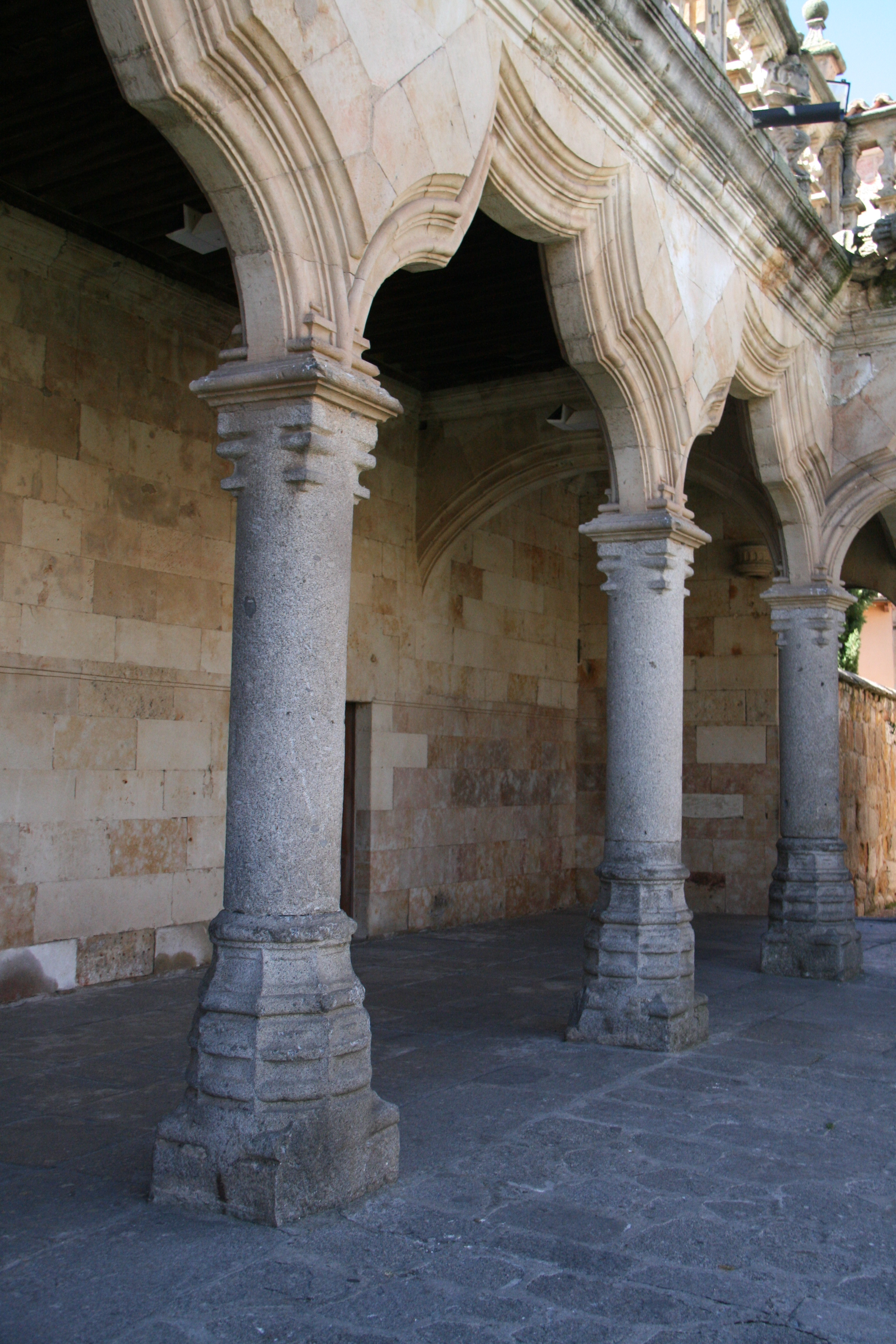 Arcos renacentistas en el Patio de Escuelas -Salamanca